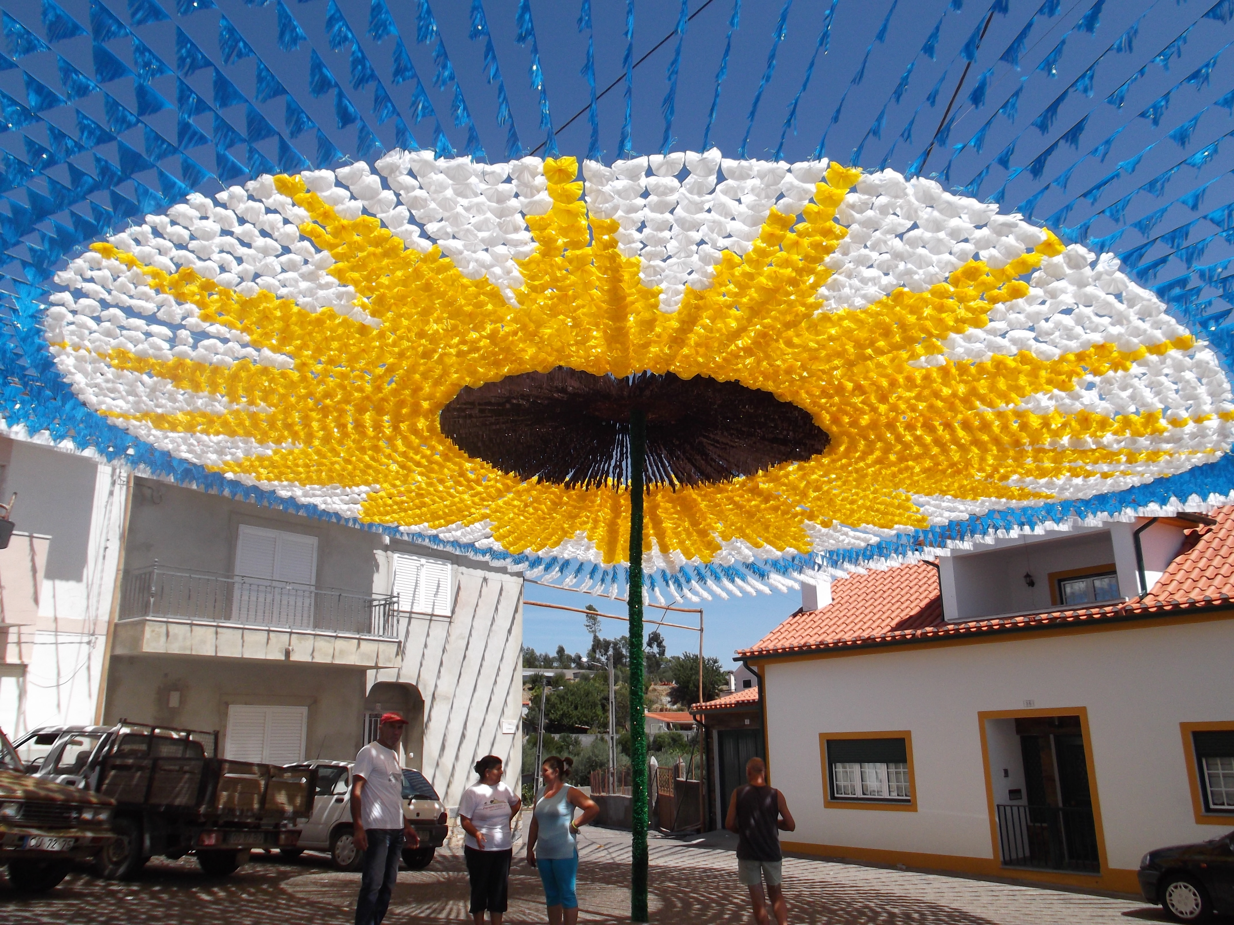 Com seis metros de altura e trinta de largura, foi considerado o maior do mundo feito de flores de plástico...